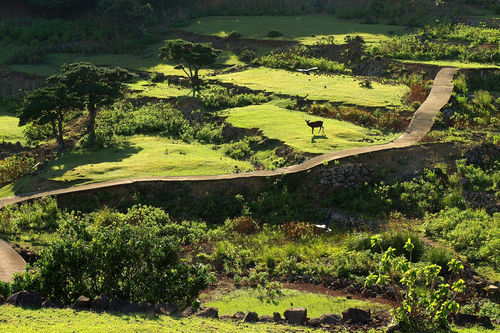 長崎県小値賀町の野崎島の自然。